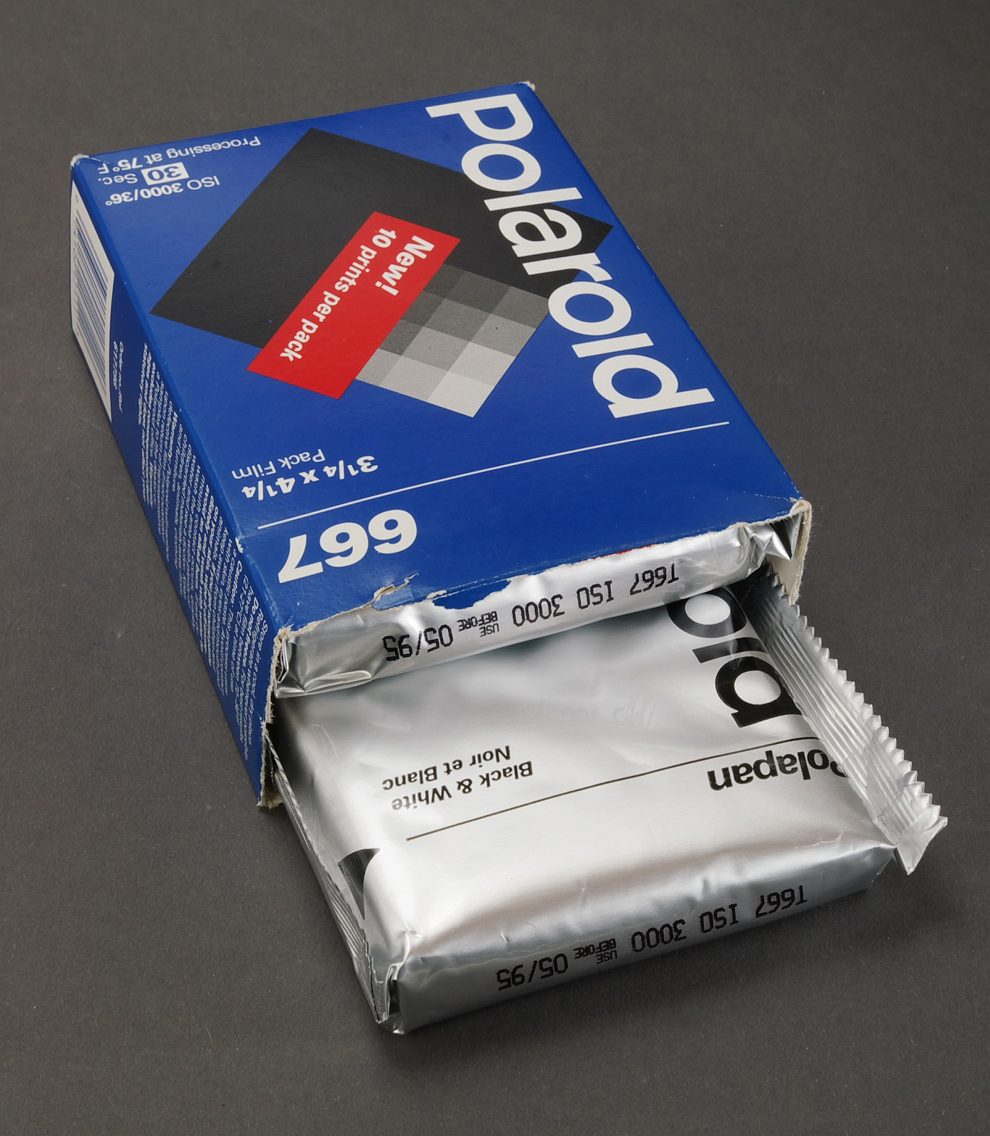 Polaroid Filmpack 667 eingeschweißt mit Verkaufsverpackung. Schwarzweißfilm mit ISO3000